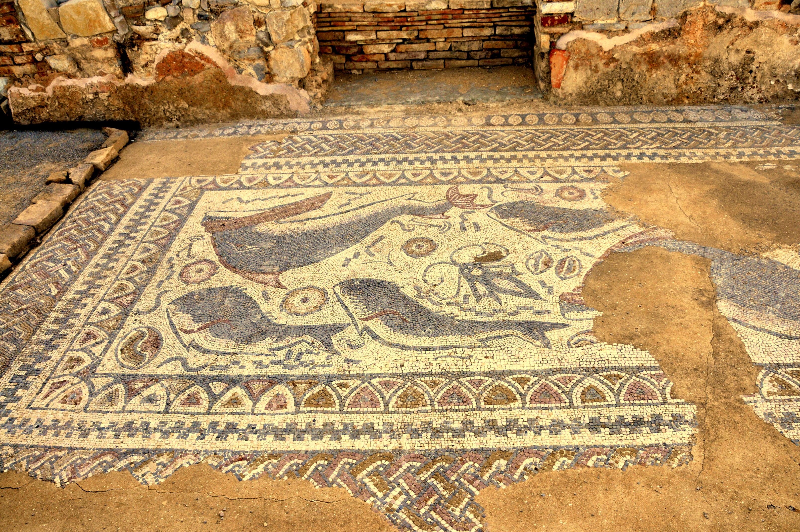 Boden-Mosaik in der Ostseite dees Peristyls